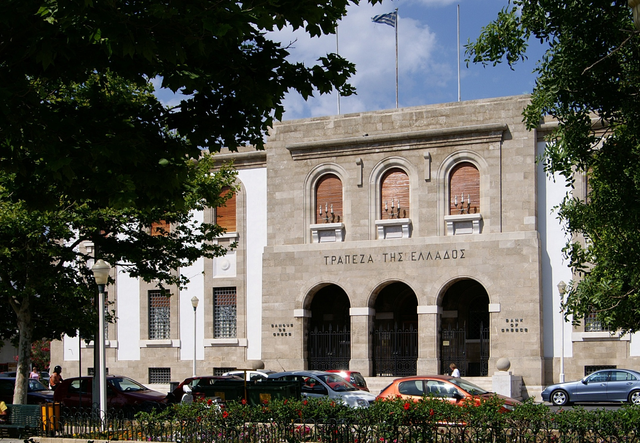 Blick vom Mandraki Hafen auf di Bank of Greece in Rhodos Stadt.